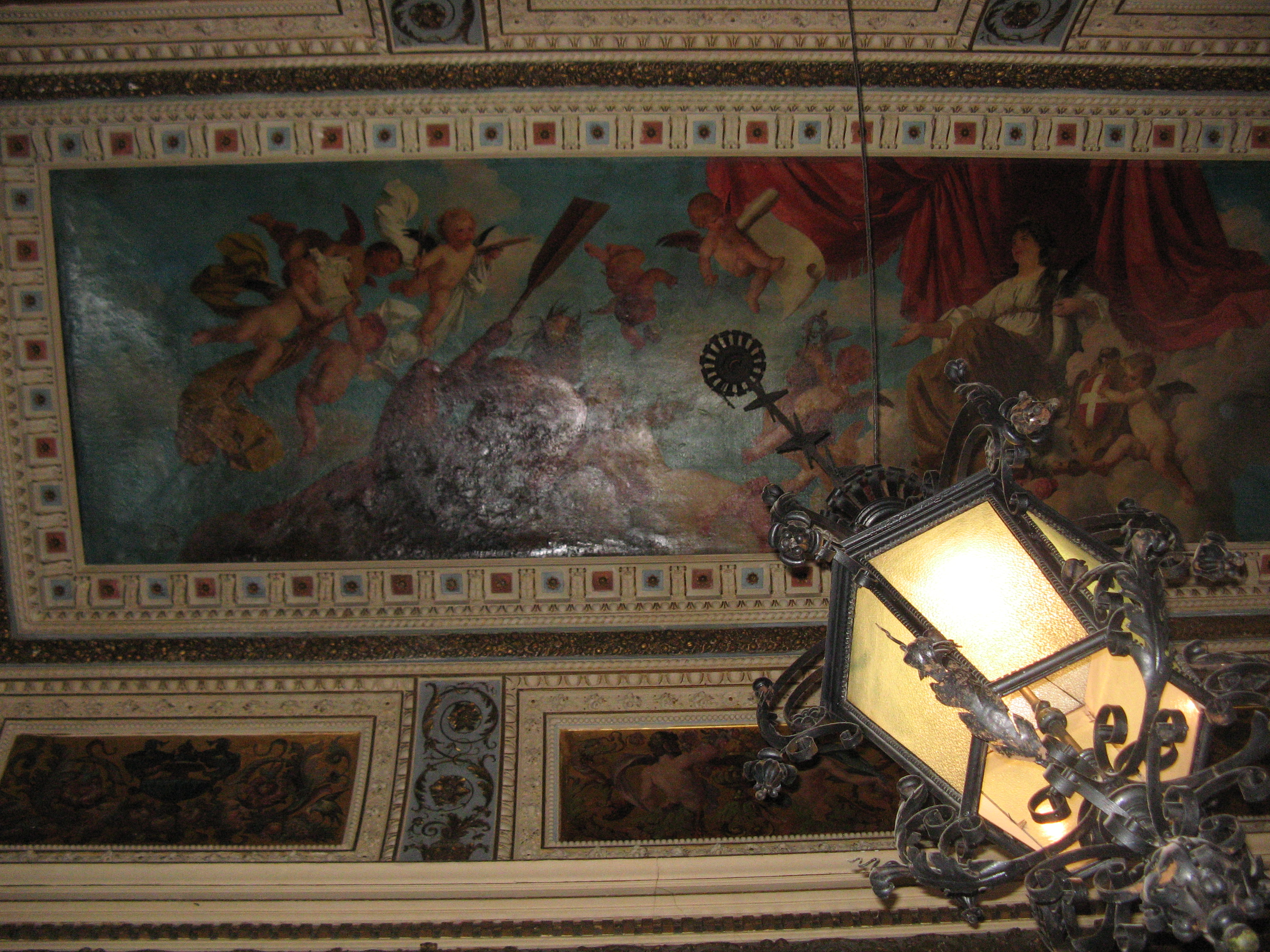 Decke des Foyers, Rathausplatz 4, Wien-Innere Stadt